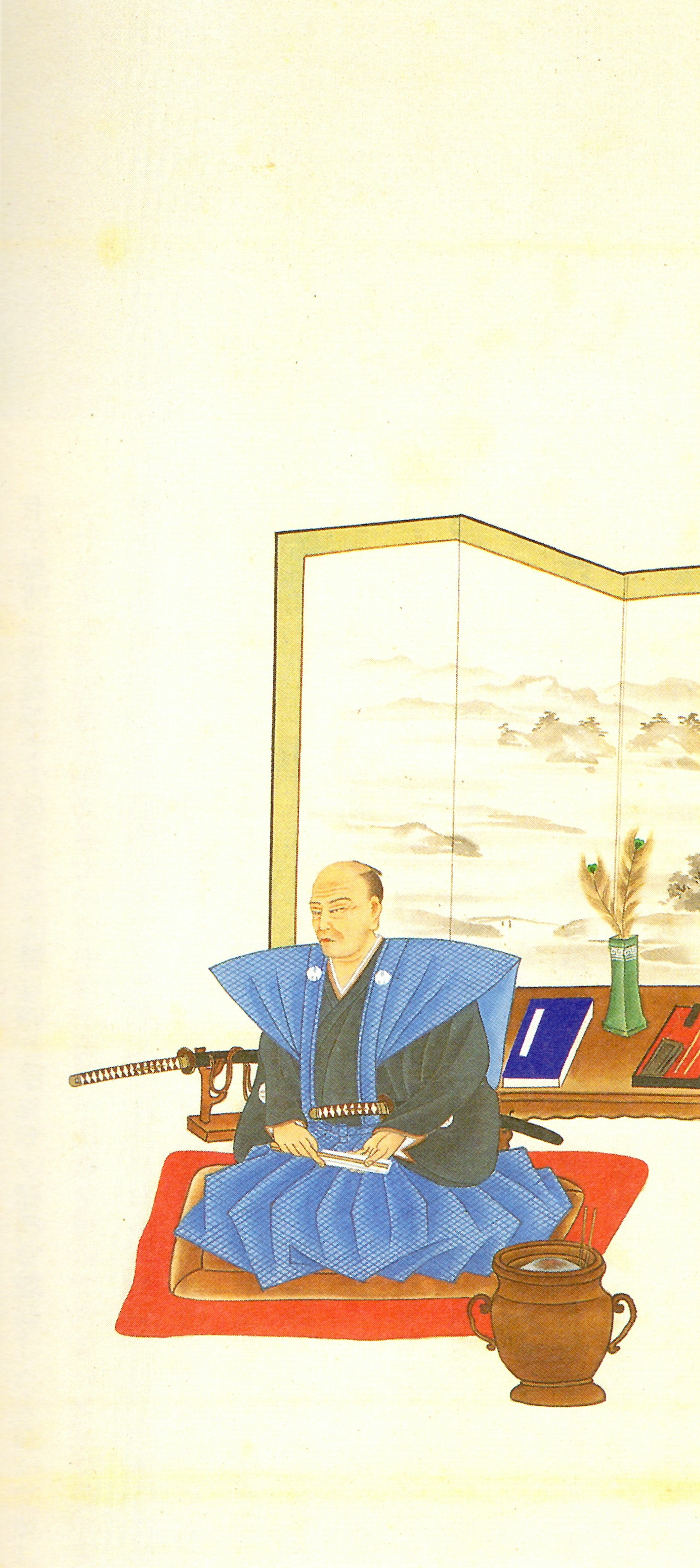 鍋島茂義の肖像。